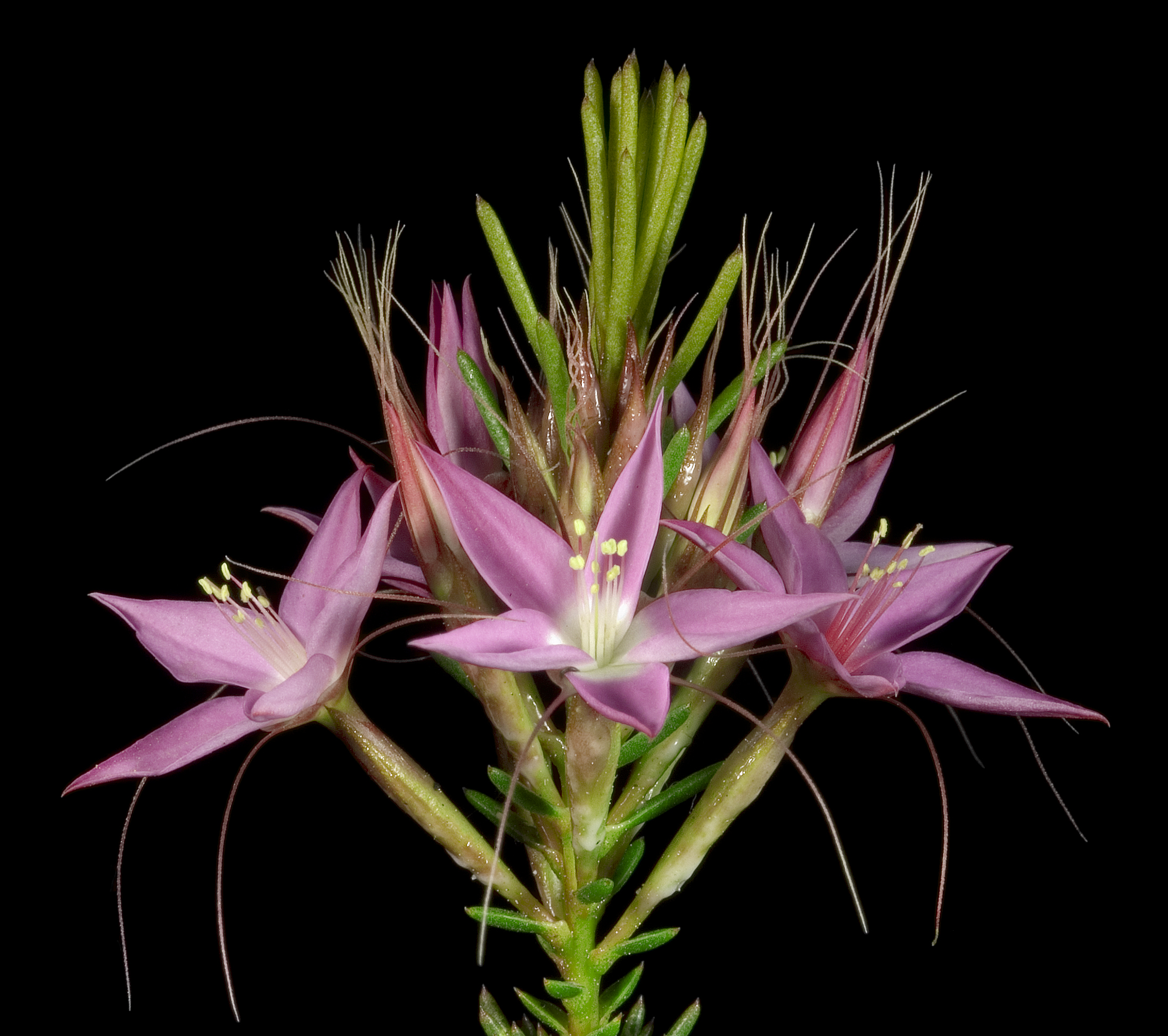 KRT3679